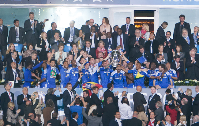 RA1_6615